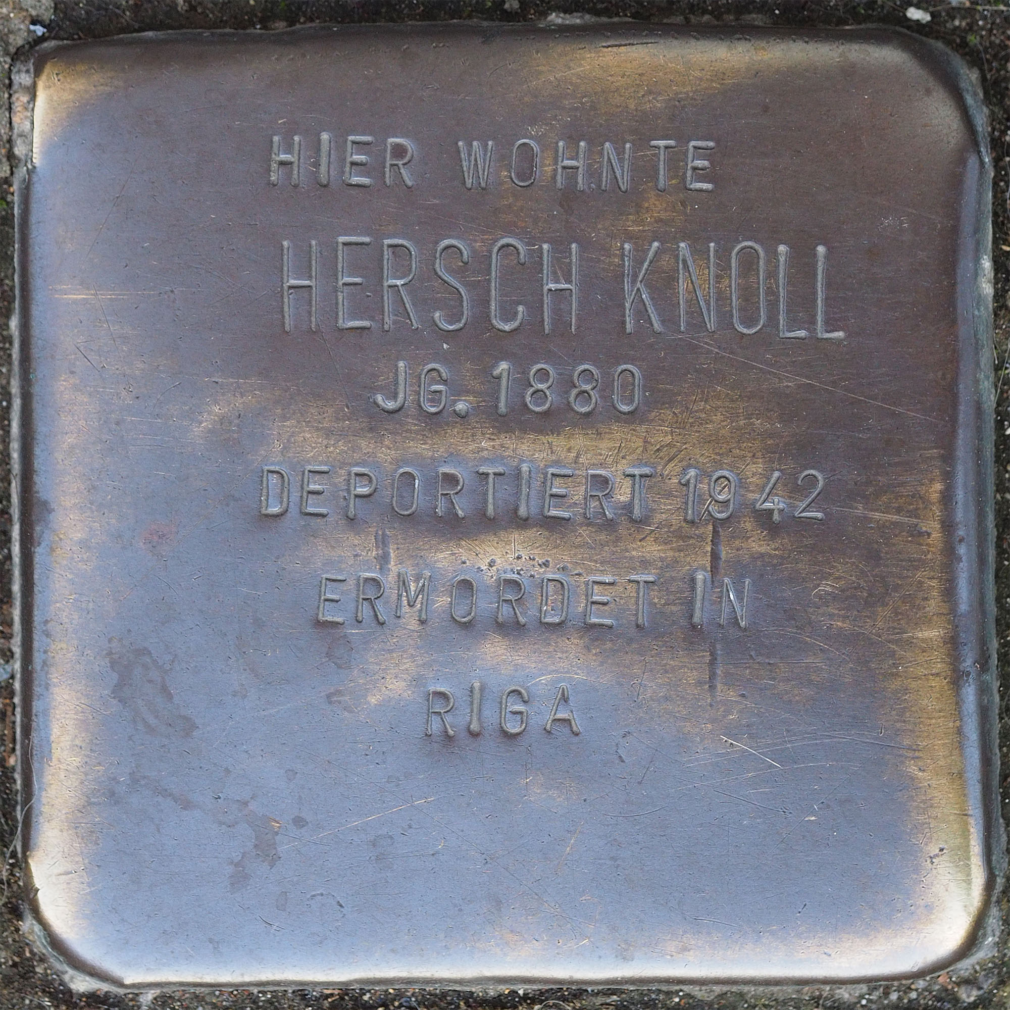 Stolperstein VIE: Knoll, Hersch